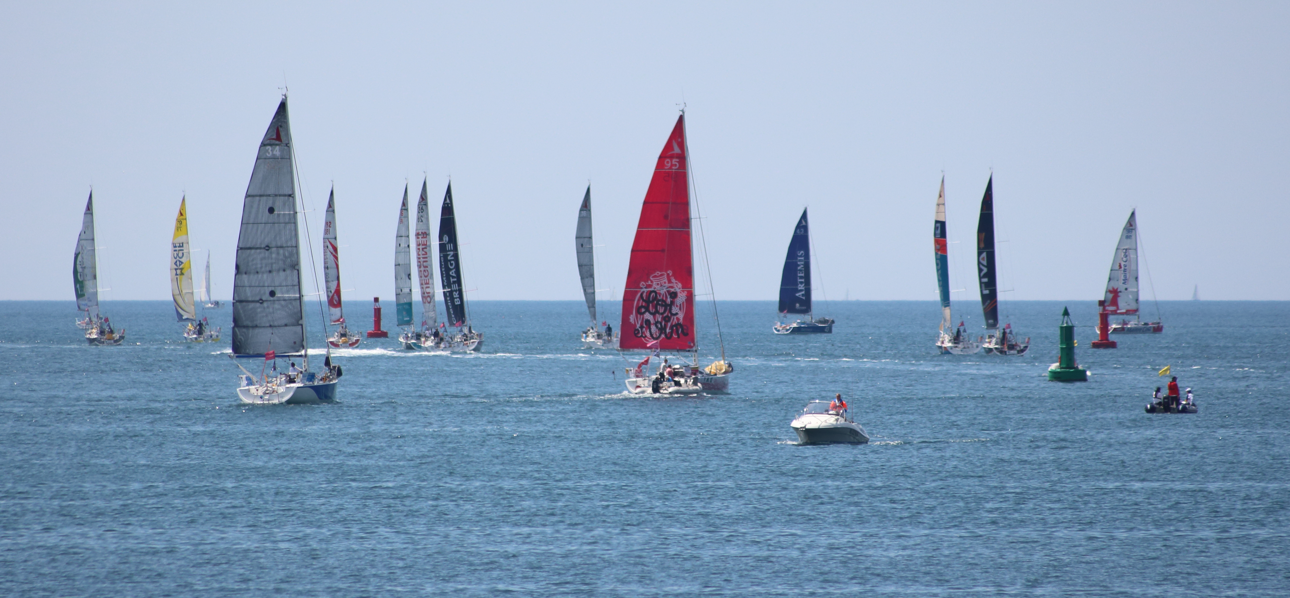 Rassemblement des concurrents devant Concarneau en vue du départ de la troisième étape de la Solitaire du Figaro 2015. Concarneau, Finistère, Bretagne, France.